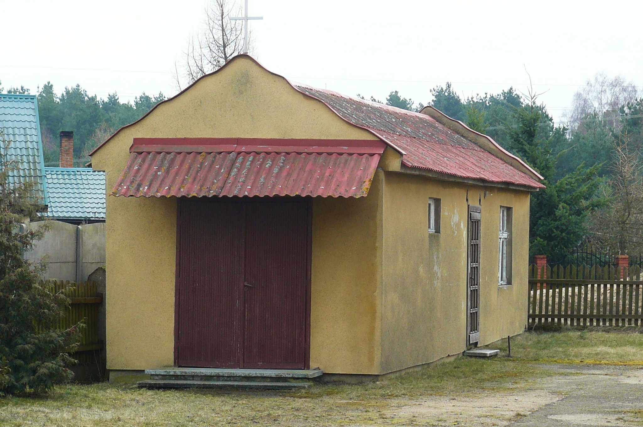 Biała - kaplica pogrzebowa przy rzymskokatolickim kościele filialnym pw. Matki Boskiej Różańcowej (1928-1932)